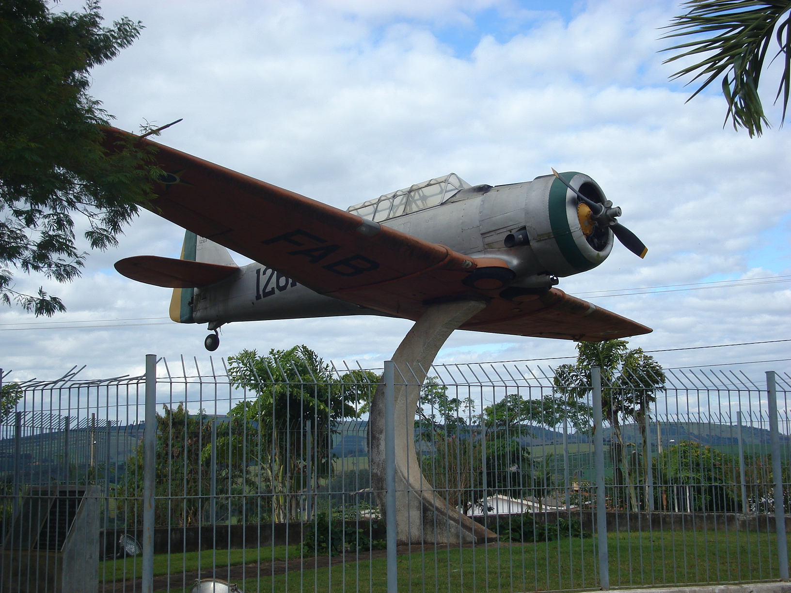 Avião Monumento - Símbolo de Paraguaçu